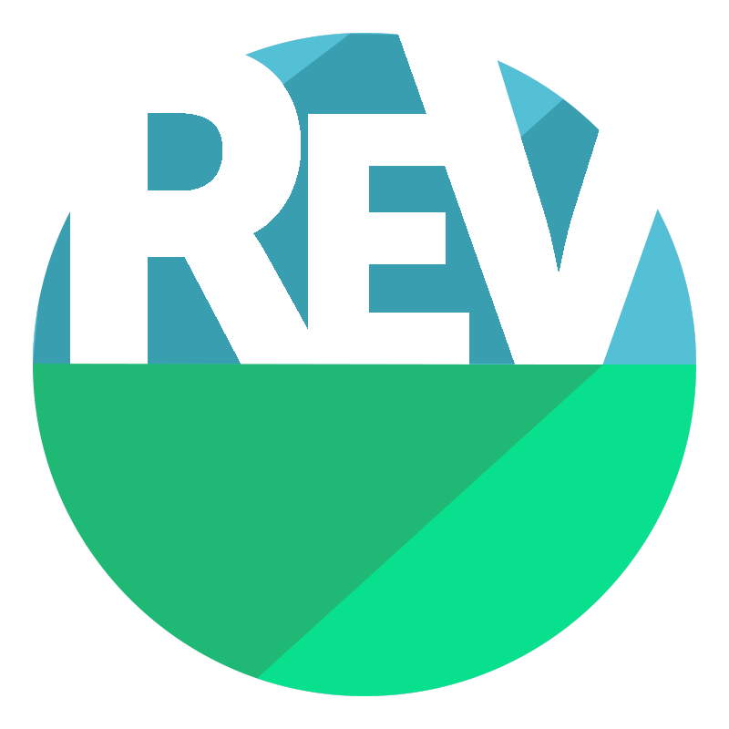 Logo du Rassemblement des écologistes pour le vivant, devenu Révolution écologique pour le vivant.